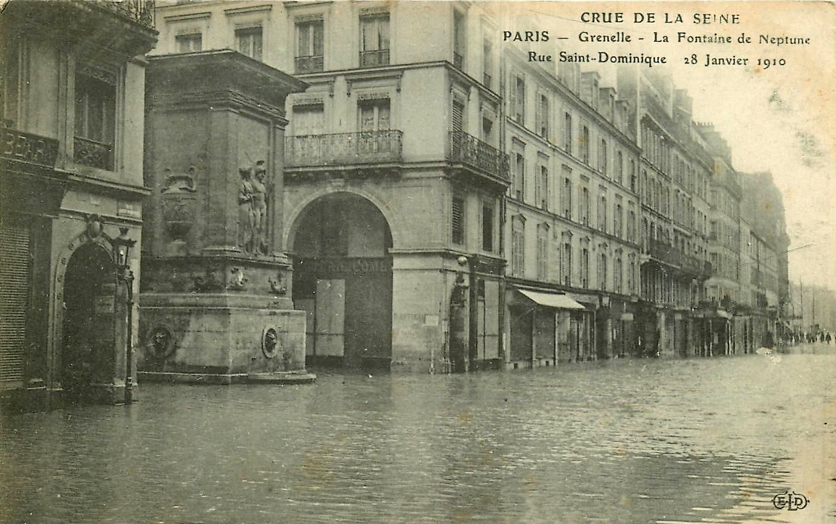 Carte postale 1910, éditeur Ernest Le Deley (E.L.D), la fontaine de Mars ou fontaine du Gros-Caillou (nommée ici fautivement fontaine de Neptune) lors des inondation de la Seine en 1910. Photographe inconnu.